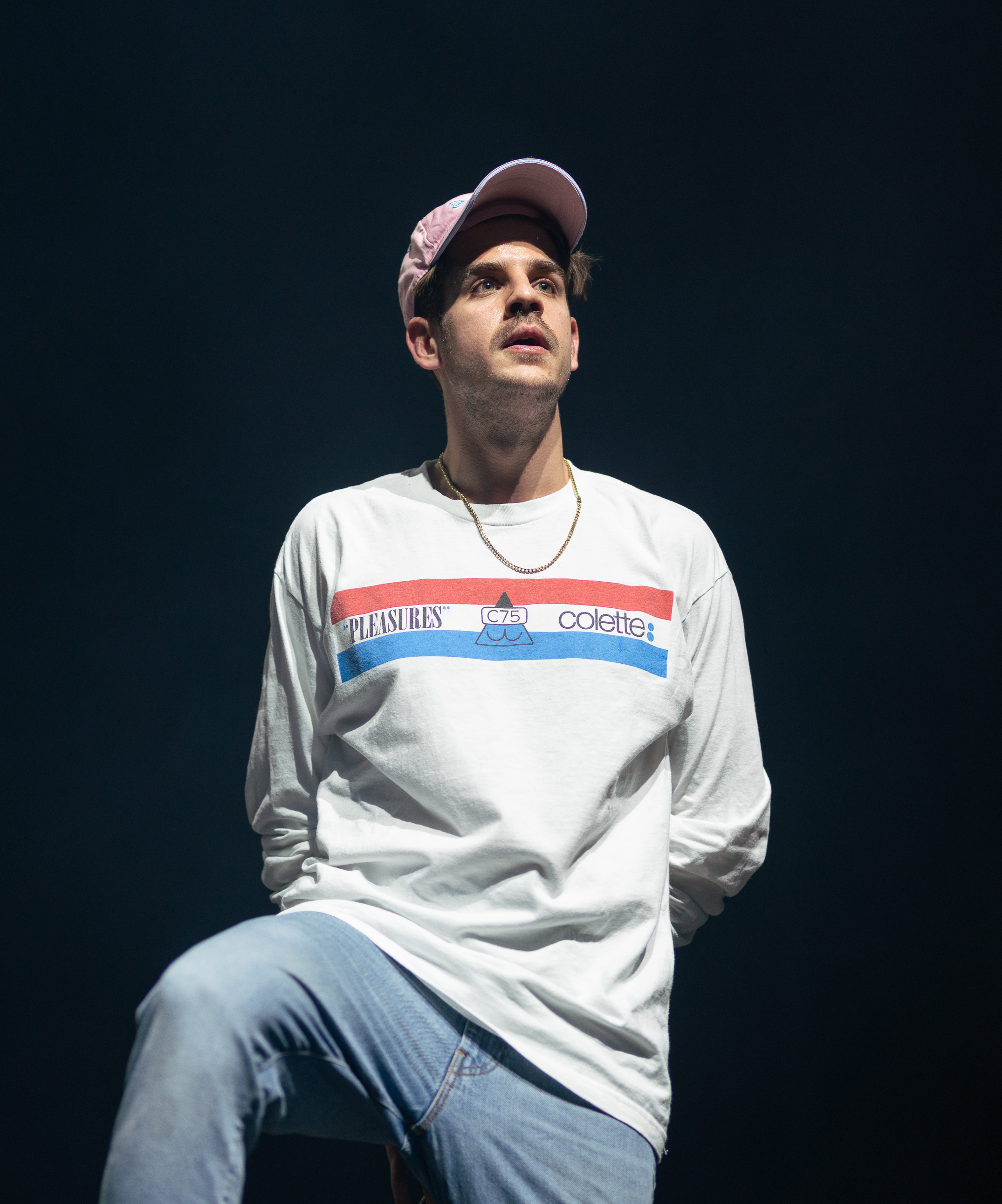 Taconafide podczas koncertu w Warszawie w ramach trasy Ekodiesel Tour promującej debiutancki album Soma 0,5 mg.